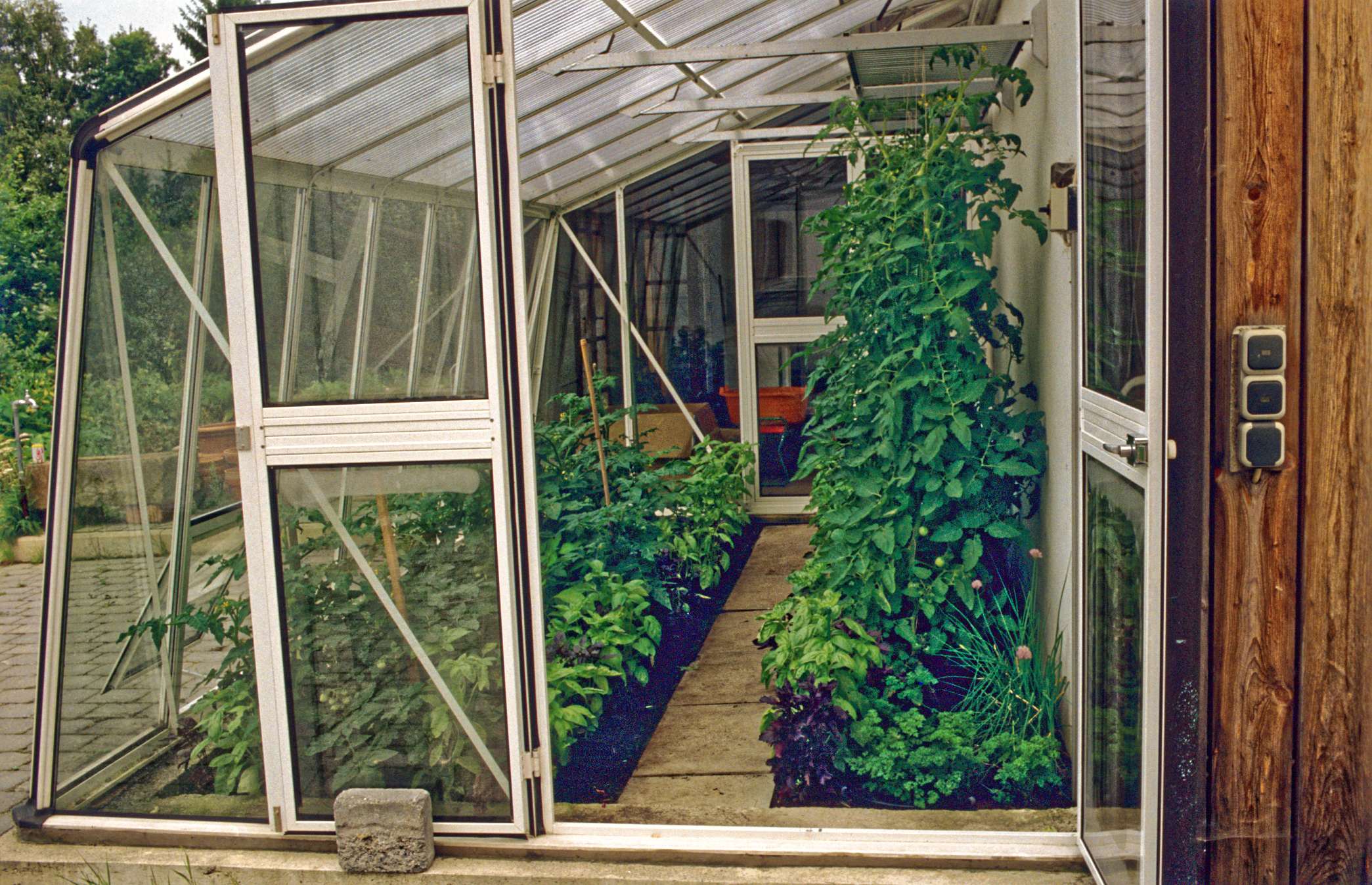 Kleingewächshaus, offene Gewächshaustür, innen Tomaten, rechts, und Paprika, links